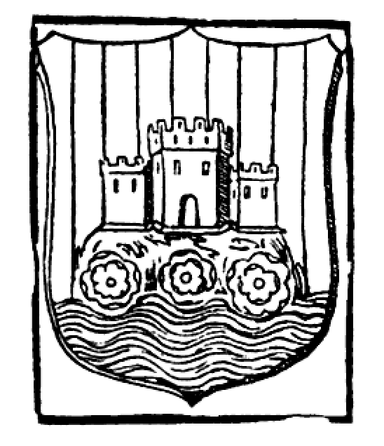 Escut d'Onda aparegut en la «Crónica de la ínclita y coronada ciudad de Valencia y de su Reyno» (Rafael Martí de Viciana, 1564)